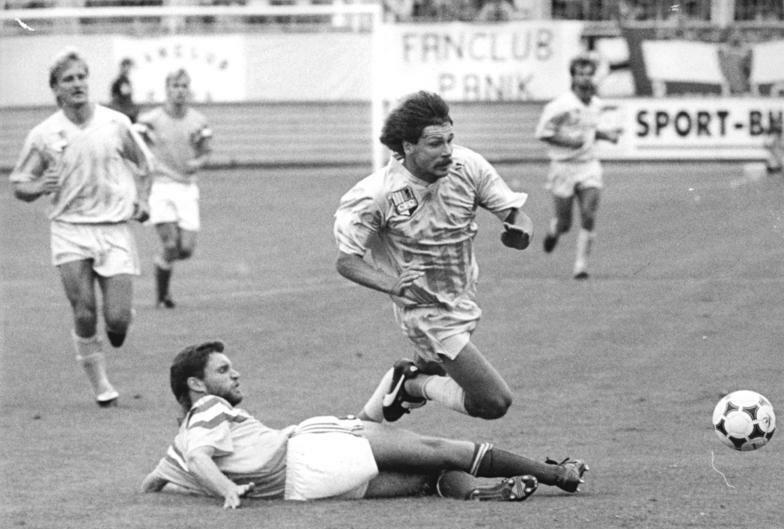 ADN-Wolfgang Thieme-18.8.90-Chemnitz-Fußball-Oberliga Chemnitz-Frankfurt Für dieses Foul an Keller (CFC) bekam der Frankfurter Woyde (am Boden) die gelbe Karte. Den Chemnitzern gelang ein etwas mühevoller, jedoch verdienter 2:0-Erfolg gegen die Armee-Elf.